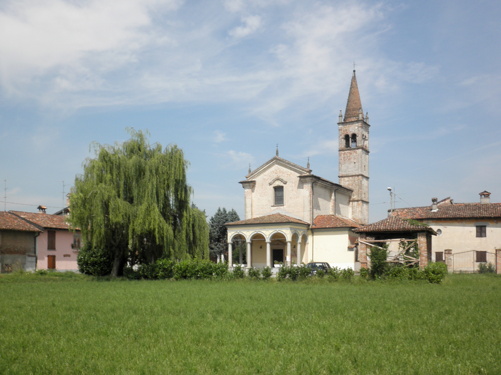 Panorama della frazione San Rocco di Dovera